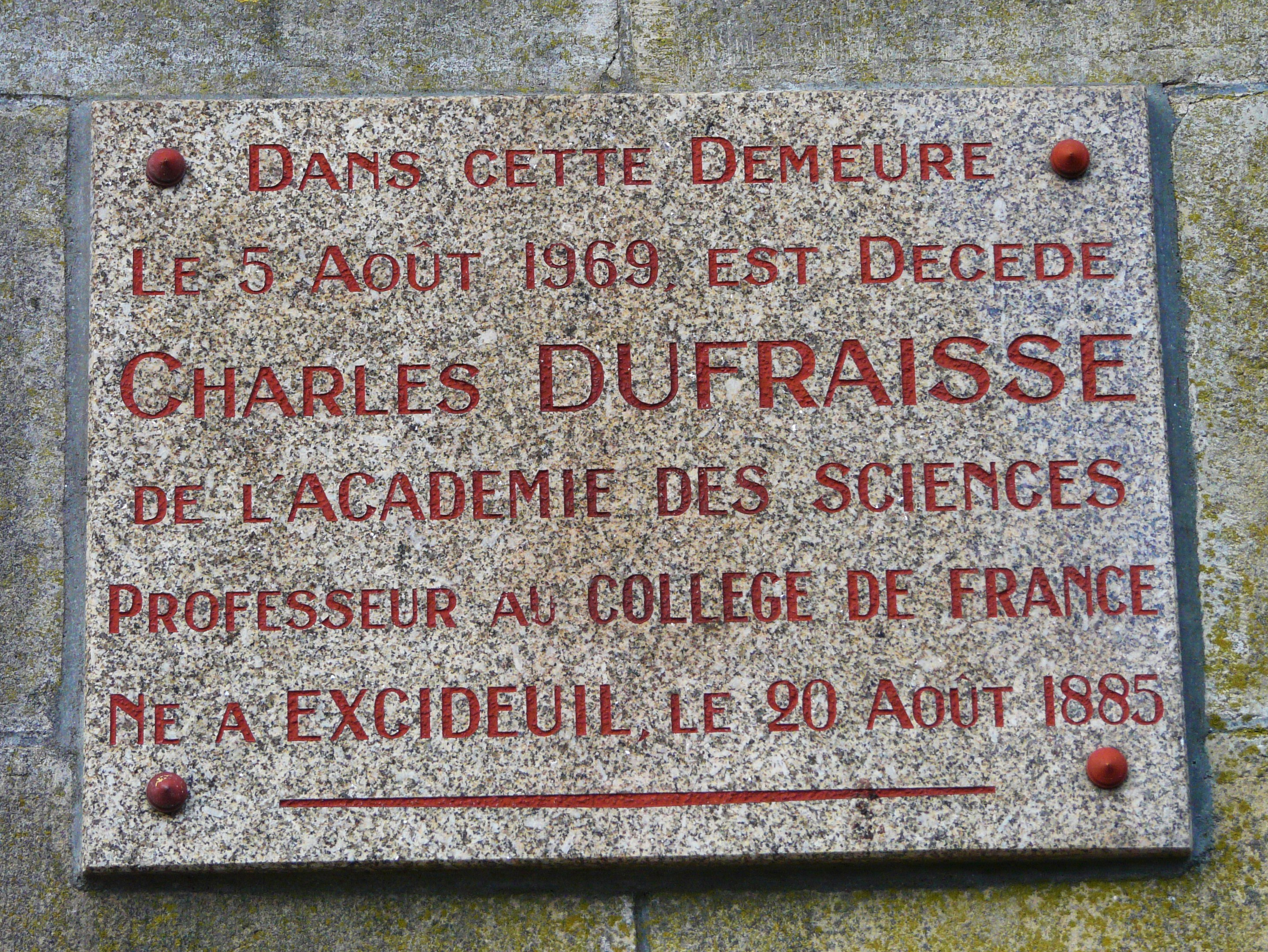 Plaque commémorative du décès de Charles Dufraisse, apposée sur le mur extérieur d'une maison d'Excideuil, Dordogne, France.